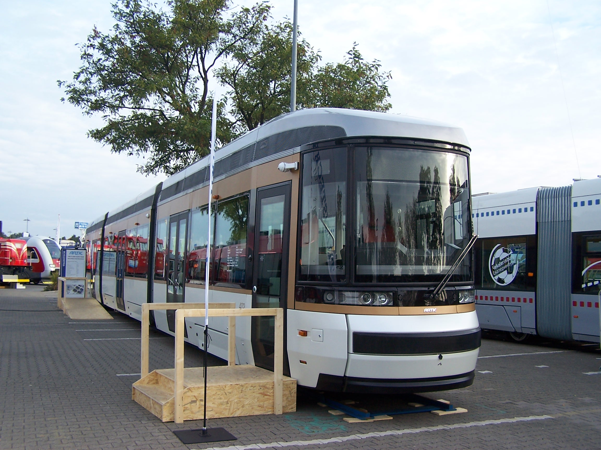 Transtech Oy Artic 402 für Helsinki auf der Innotrans 2014